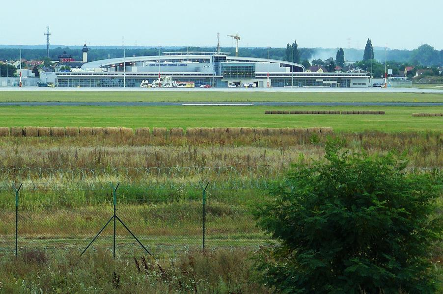 Sytkowo - Poznań. Widok na lotnisko Ławica.